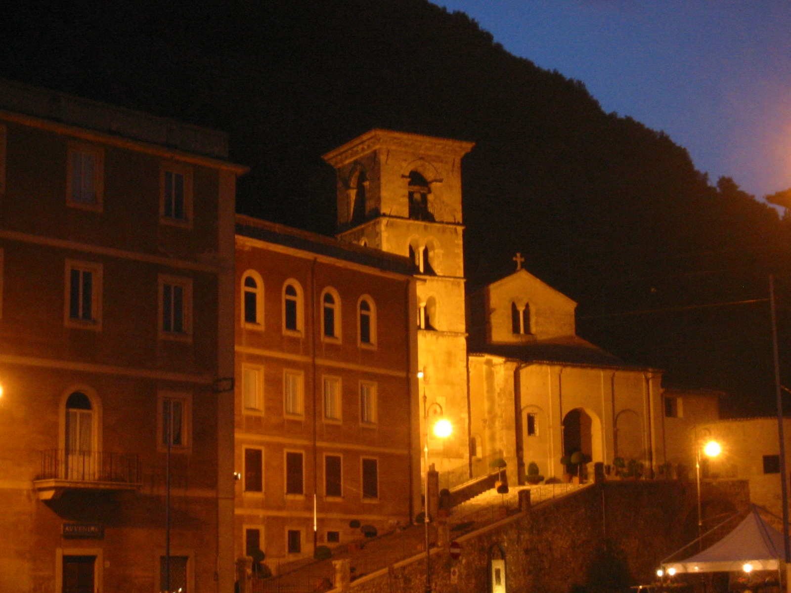 Vue de Sora, la nuit.